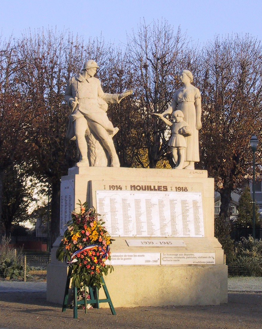 Monument aux morts de la ville de Houilles, France avec une gerbe de fleurs. Le monument est composé d'une stèle surmontée d'une sculpture. Les noms des soldats sont gravés sur la stèle et la sculpture représente un conscrit en uniforme quittant sa femme et son enfant.